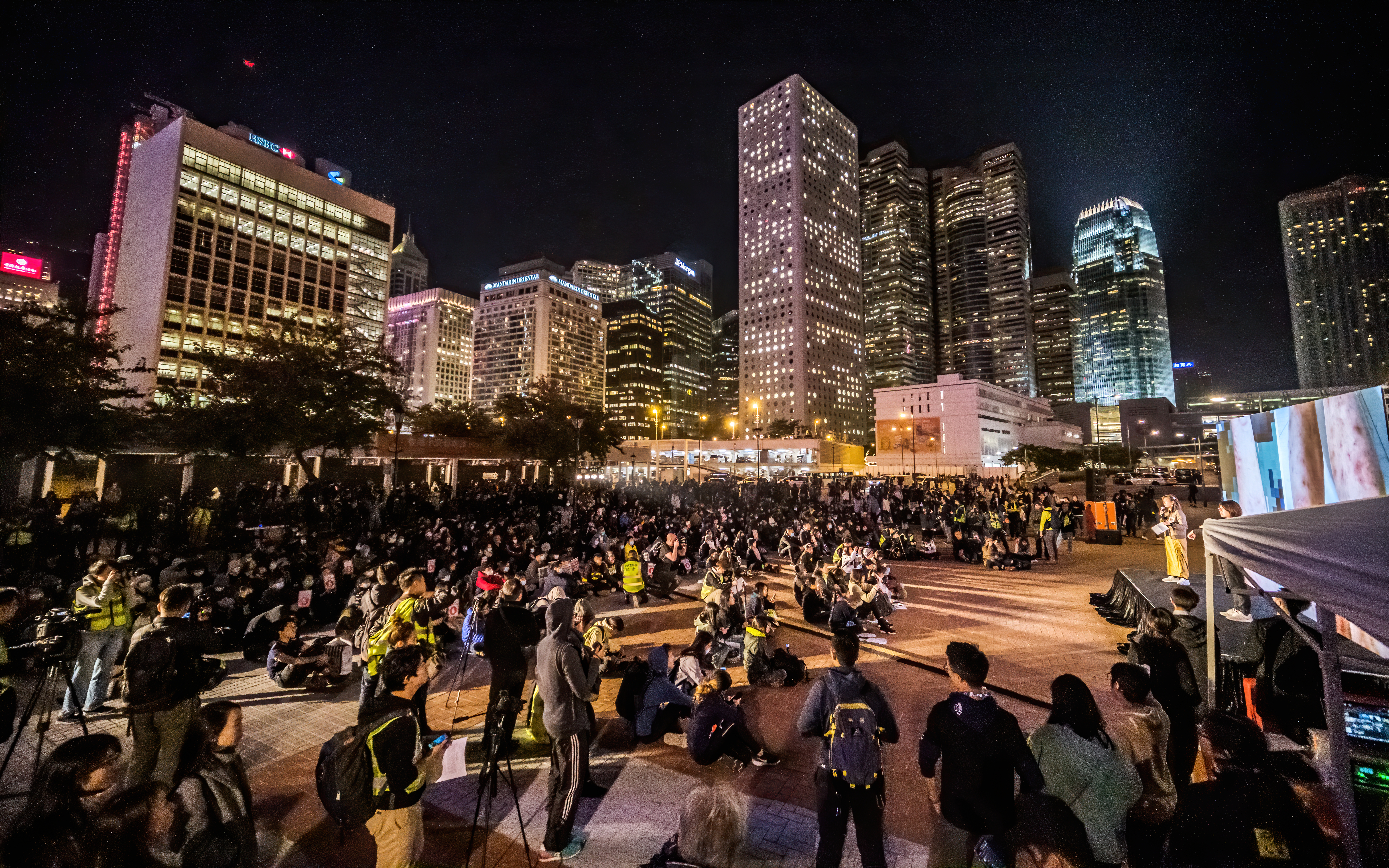 DSCF3216-denoise